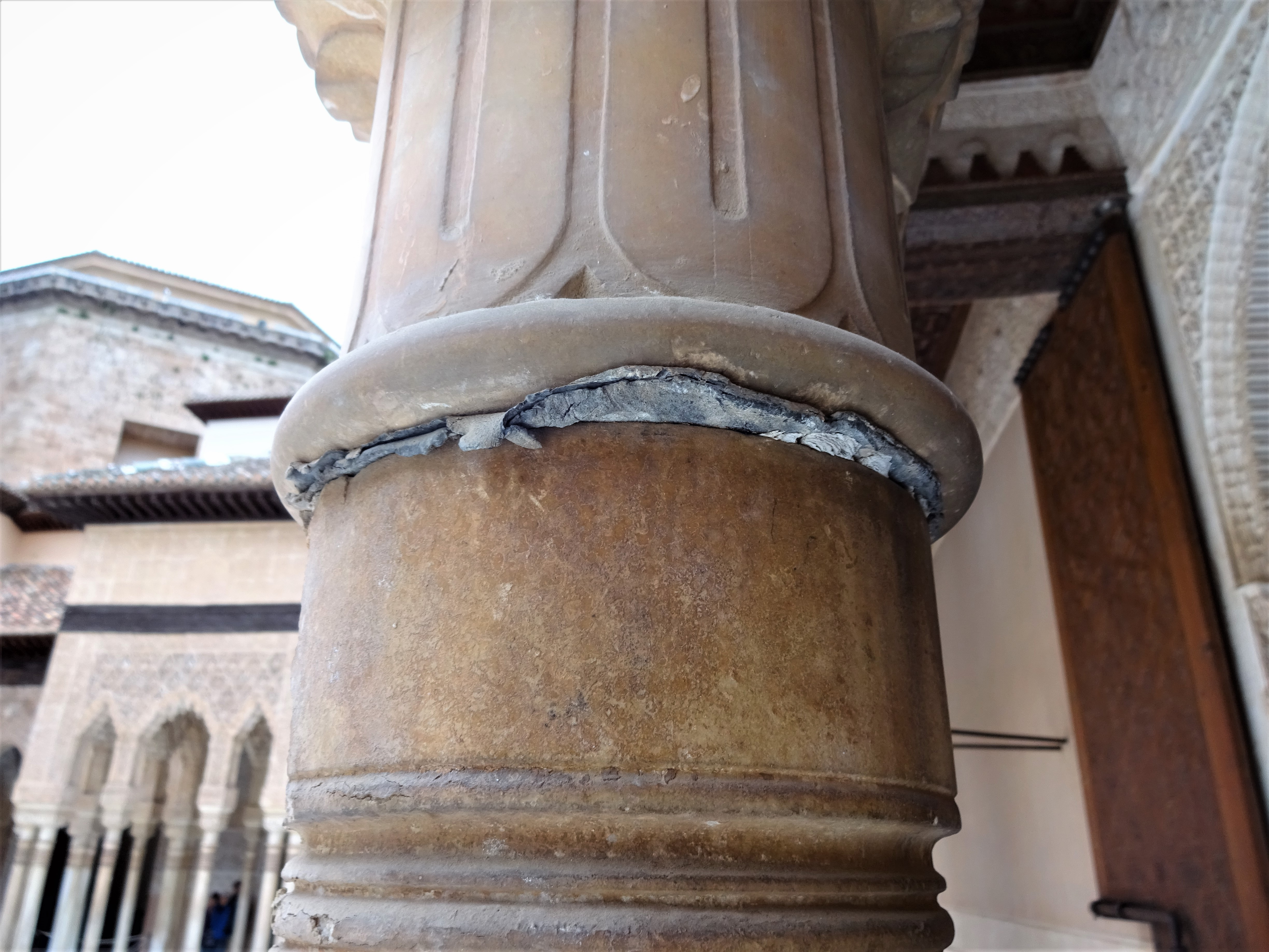 Bleischicht für Erdbebenschutz zwischen Schaft und Kapitell in Säule, Löwenhof Alhambra, soll bei leichten Erschütterungen, die Wahrscheinlichkeit des Brechens der Säule mindern